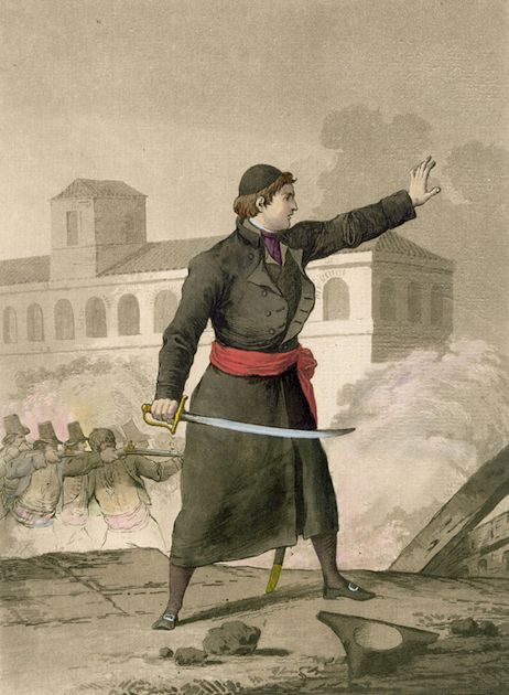 Santiago Sas, heróico defensor de la ciudad de Zaragoza.